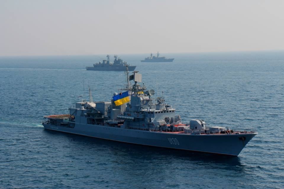 Фото: Павло Парфенюк